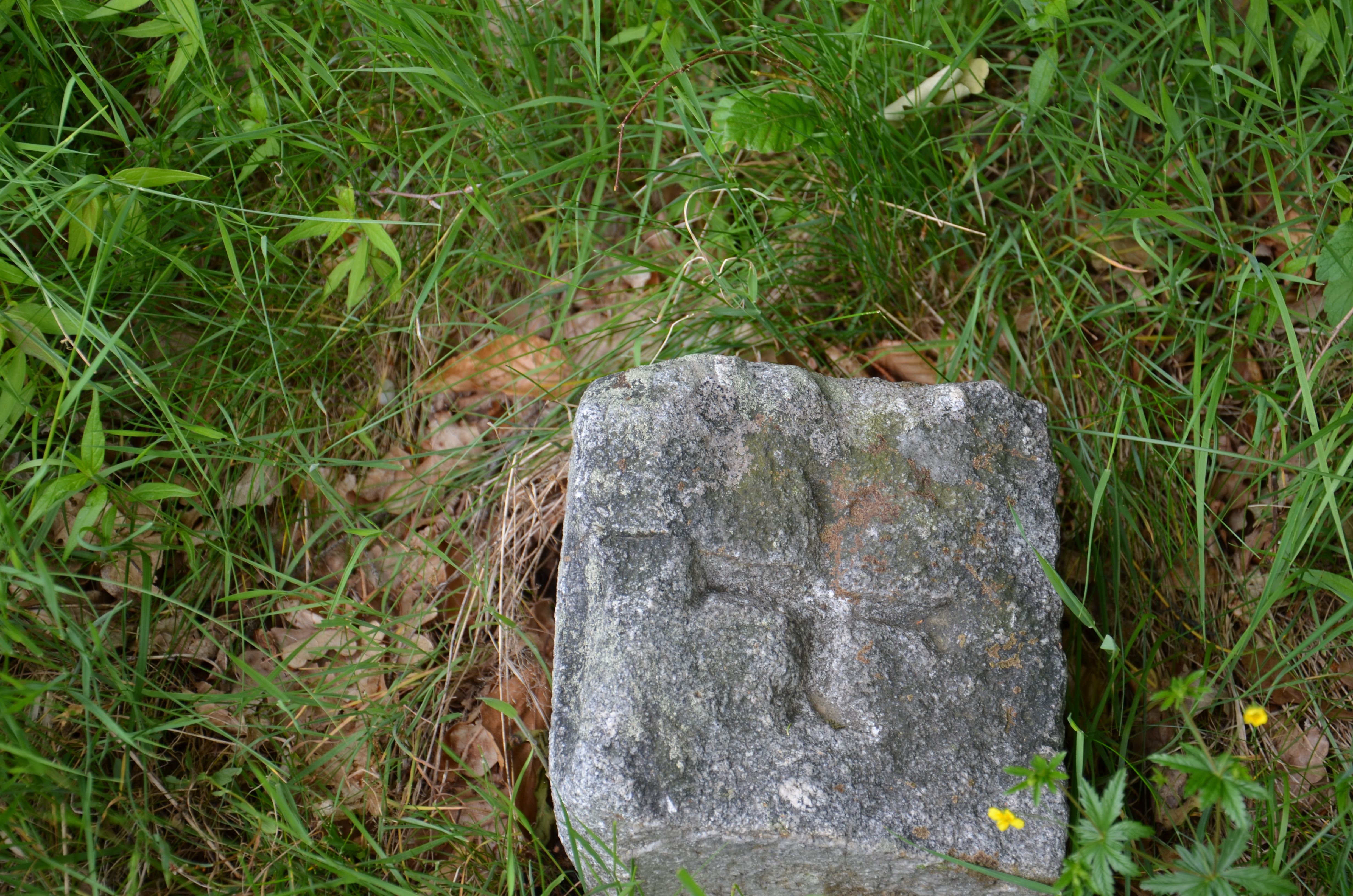 granicznik